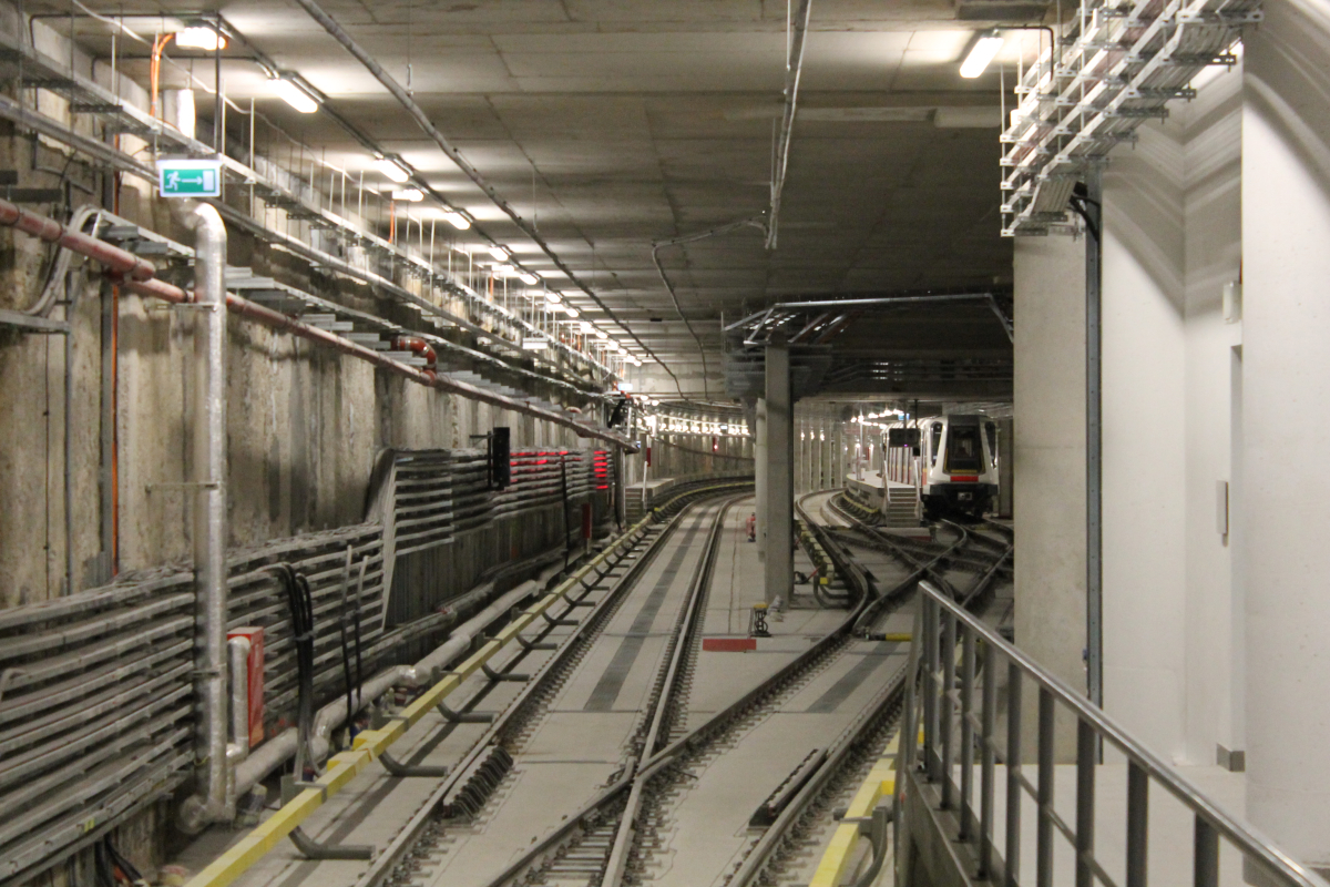 Tory odstawcze na wschód od stacji C15 Dworzec Wileński.